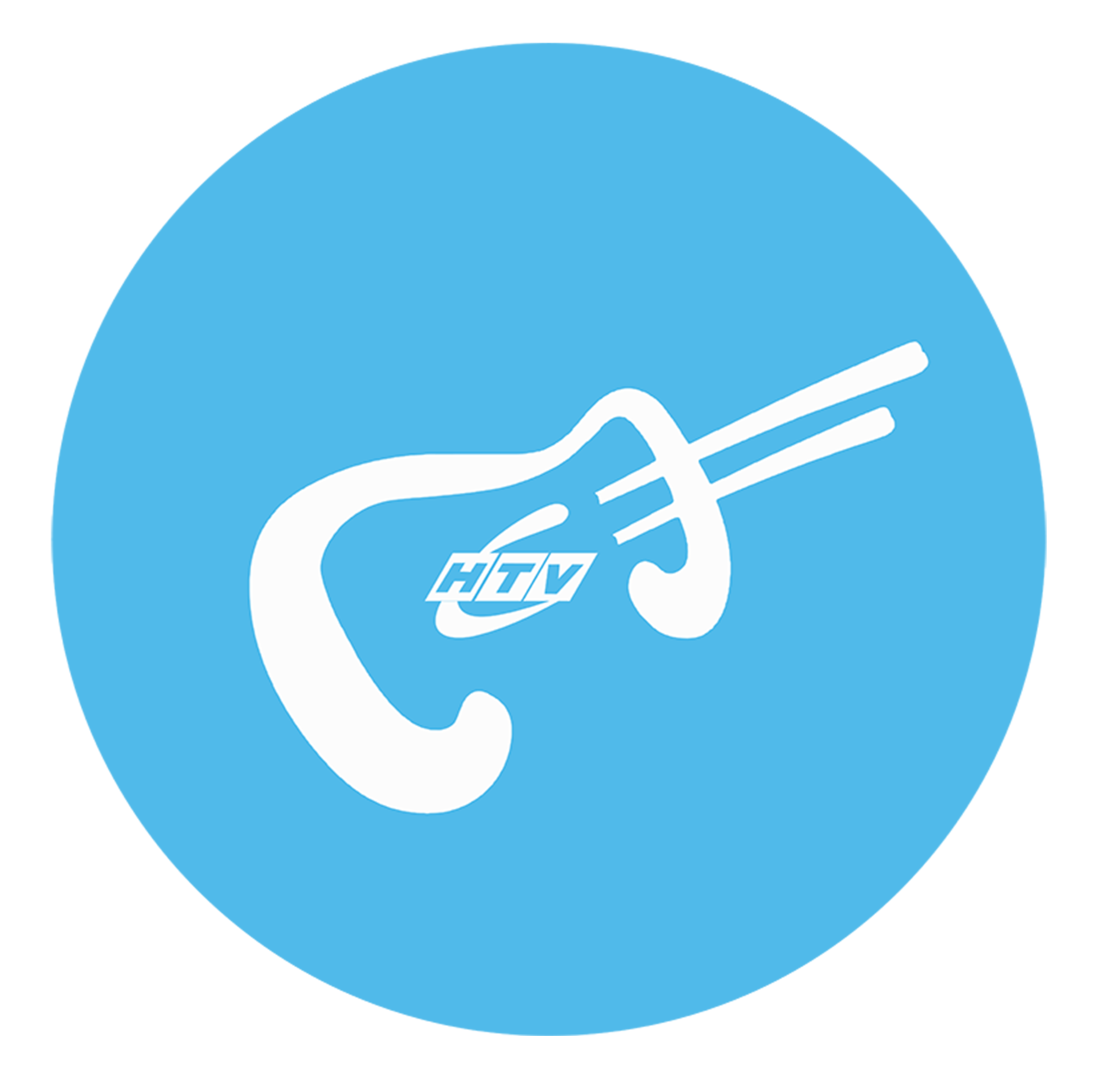 Kênh HTVC Ca Nhạc